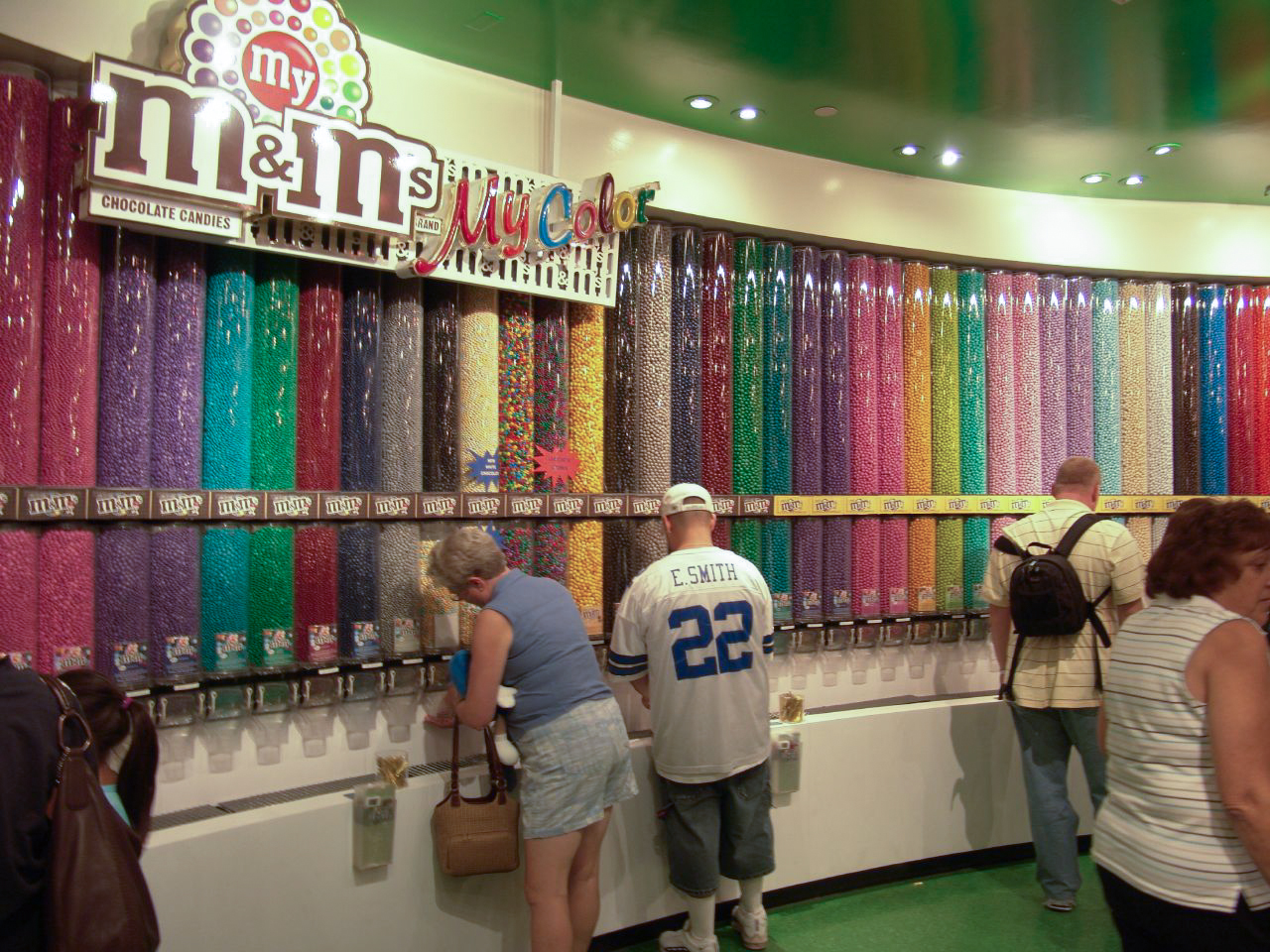 Mundo M&M en Las Vegas.